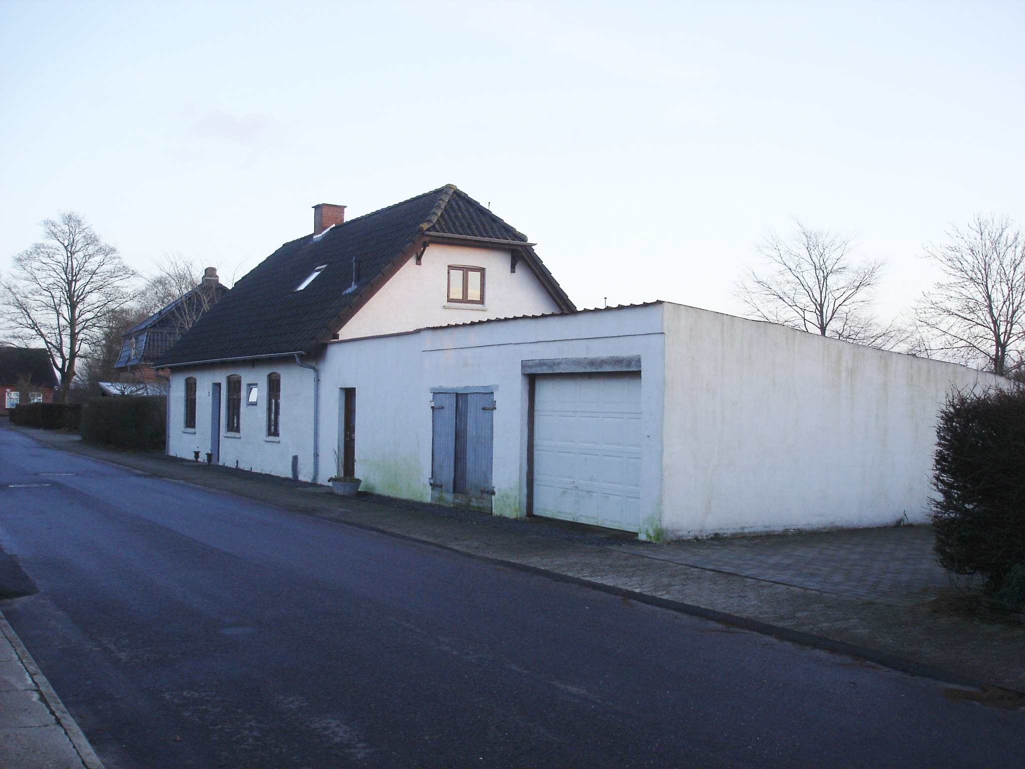 Viuf Station fra vest